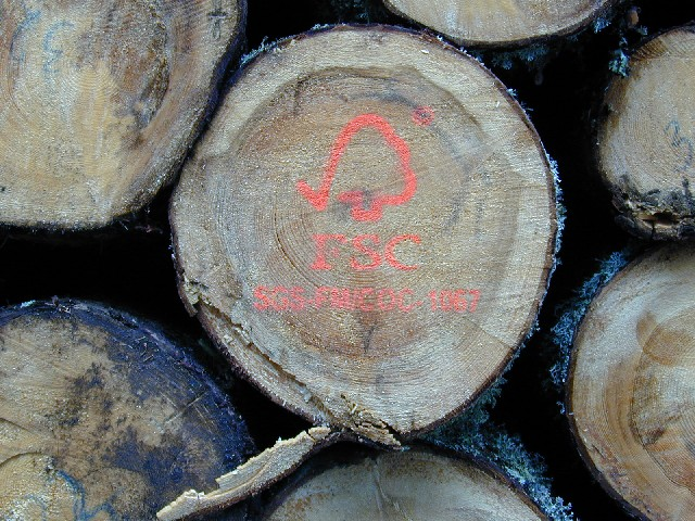 Forest Stewardship Council FSC / zertifiziertes Fichtenholz im Schwarzwald